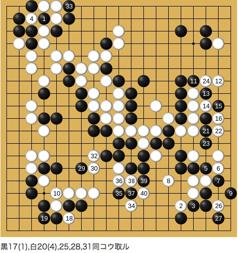 第4期名人戦挑戦手合七番勝負第3局 1965年8月19-20日 坂田栄男名人(先番)-林海峰 129-168手